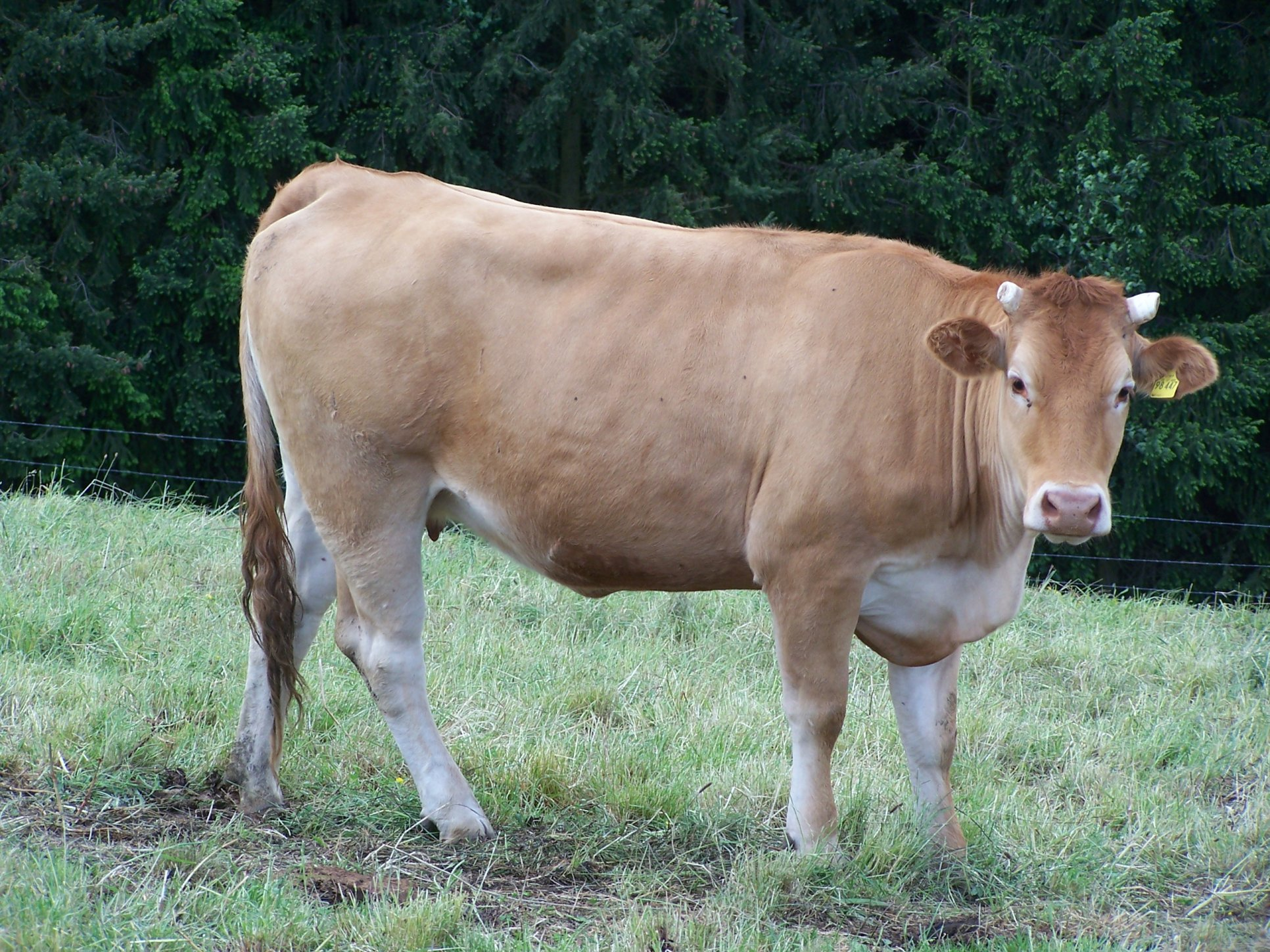 A Glan Cattle cow. Photographed in Raumbach (near Meisenheim, Rheinland-Pfalz)